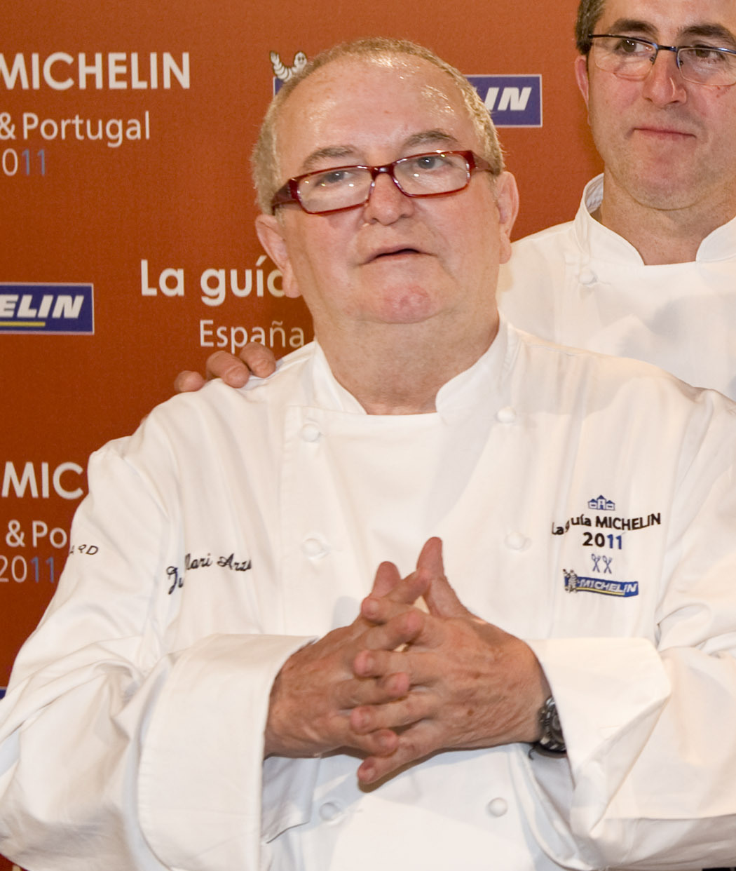 El Lehendakari ha presidido la presentación de la Guía Michelín en San Sebastián // Lehendakaria Michelin Gida aurkezteko ekitaldiaren buru izan da Donostian